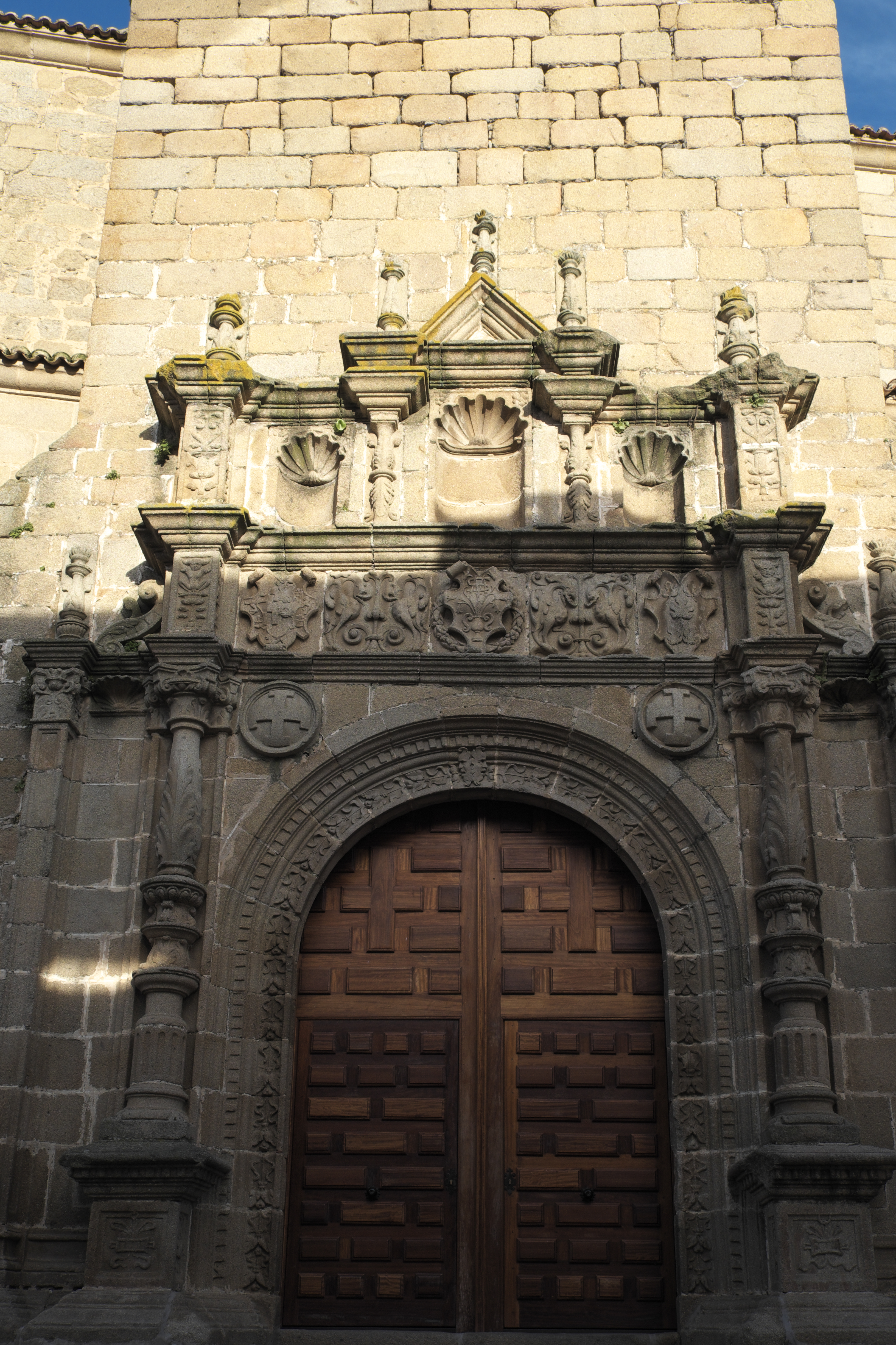 Kirche Nuestra Señora de la Asunción in Oropesa in der Provinz Toledo (Kastilien-La Mancha/Spanien), Portal